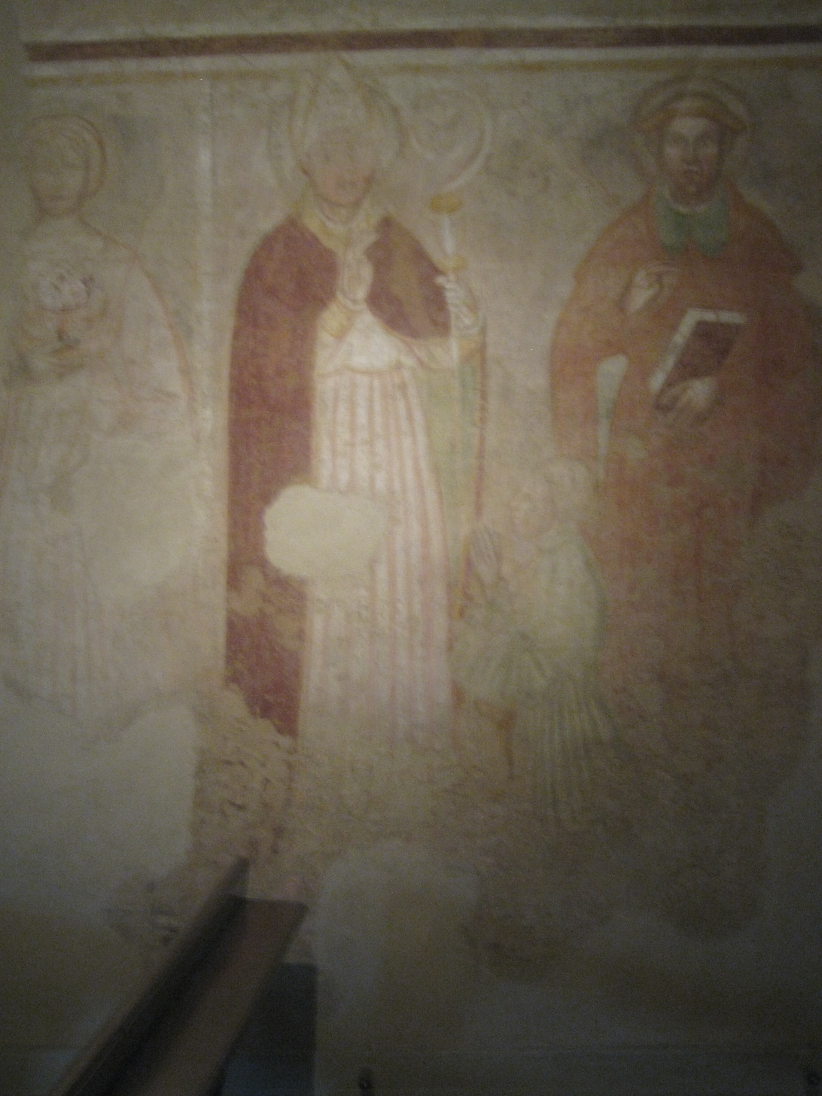 Chiesa di Sant'Ambrogio This is a photo of a monument which is part of cultural heritage of Italy.